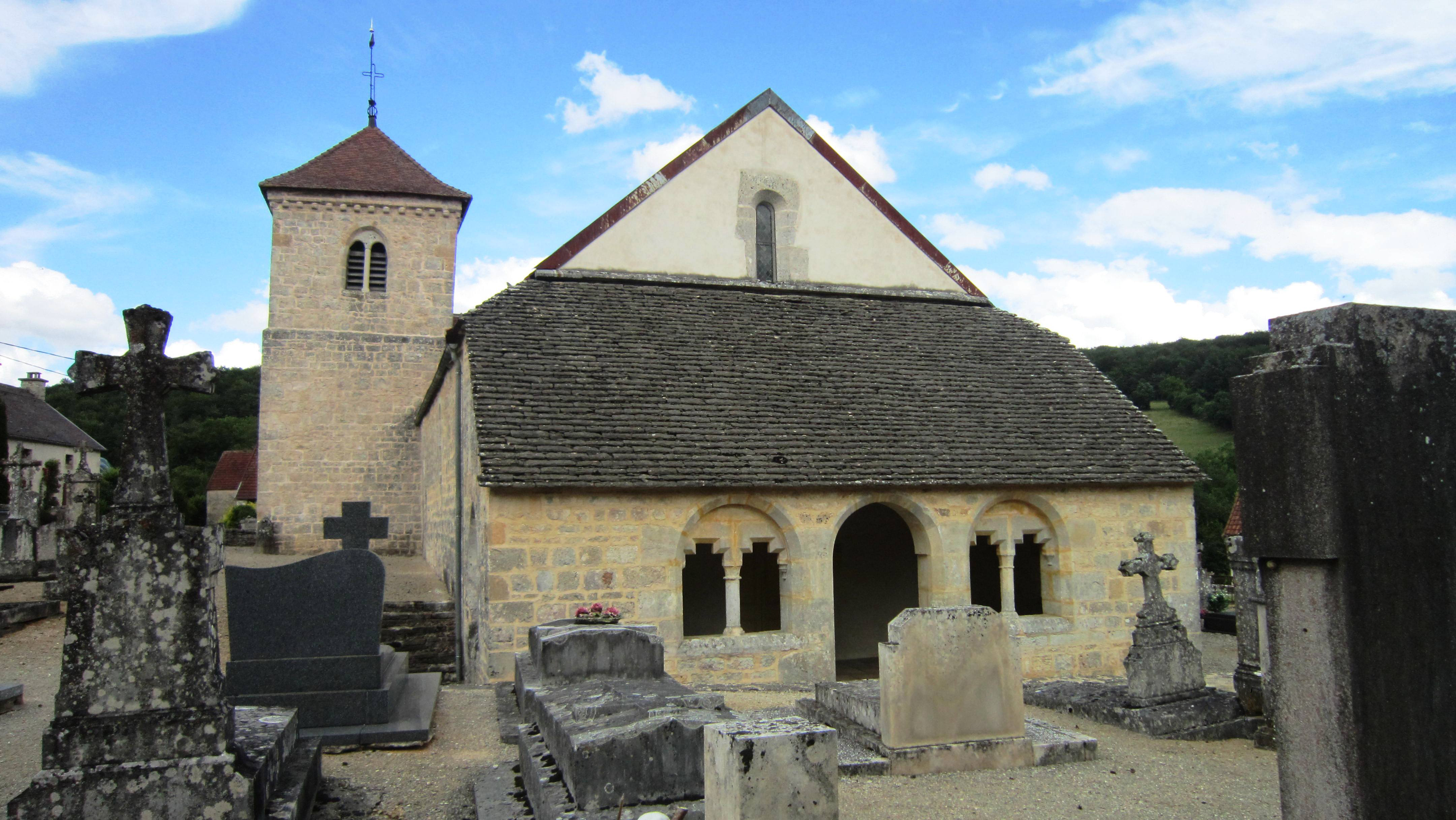 Église de Terrefondrée (Côte-d'Or, Bourgogne, France).